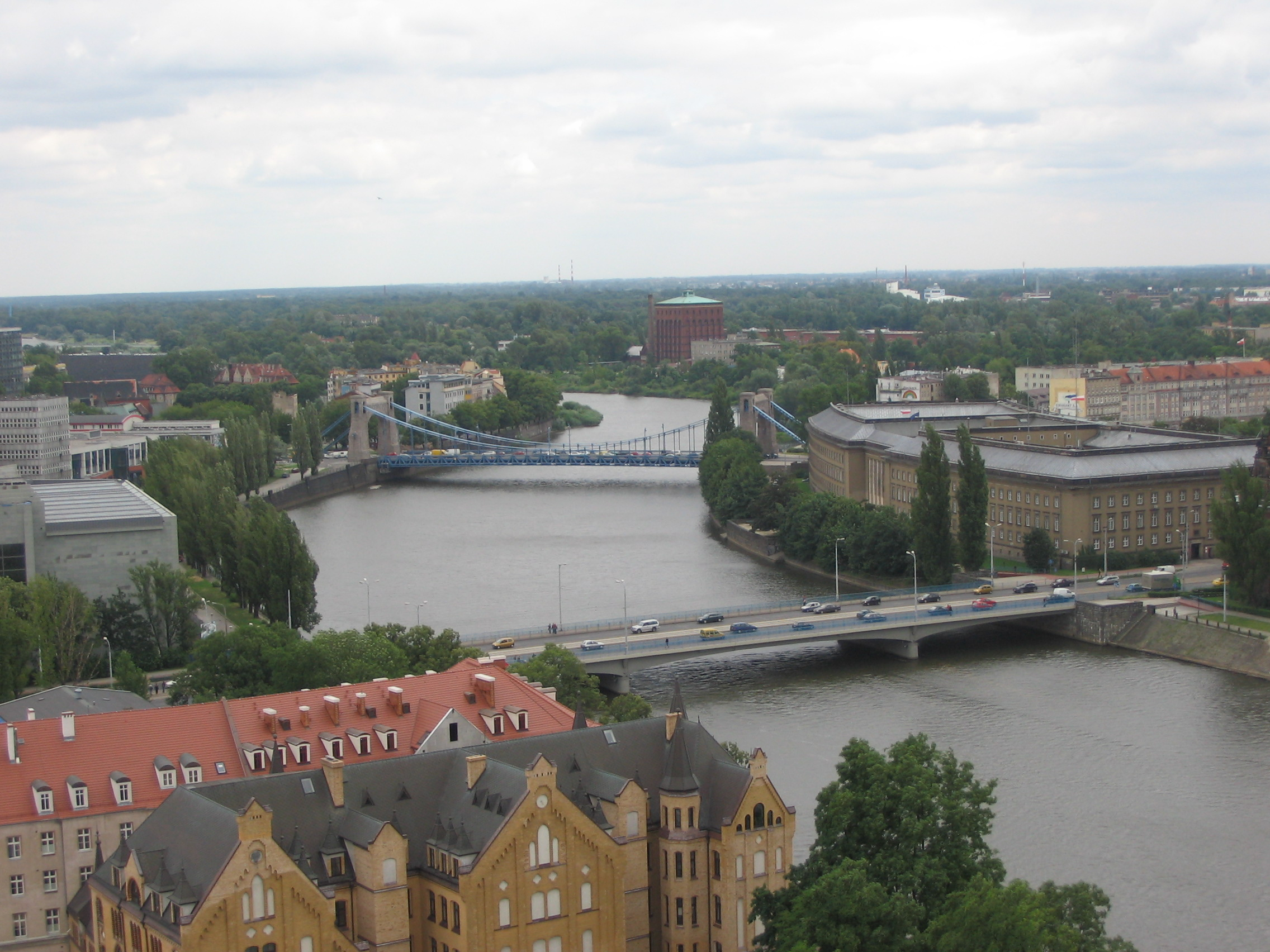 Wrocław - Most Grunwaldzki oraz Most Pokoju - widok z wieży Katedry Wrocławskiej - Grunwald bridge over Odra river